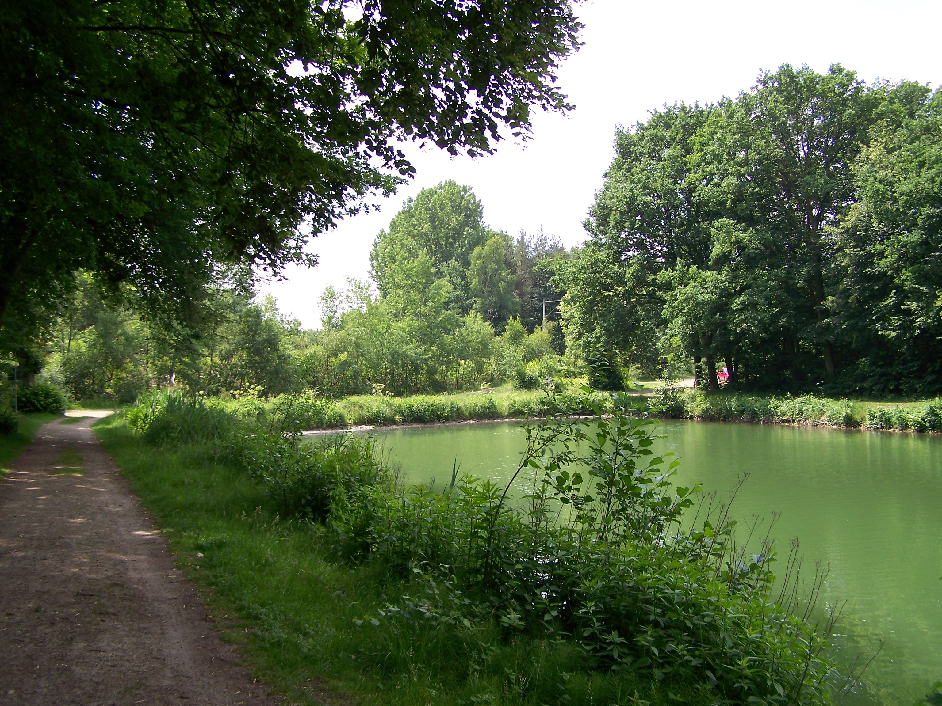 Ende des Stichkanals an der Bahntrasse